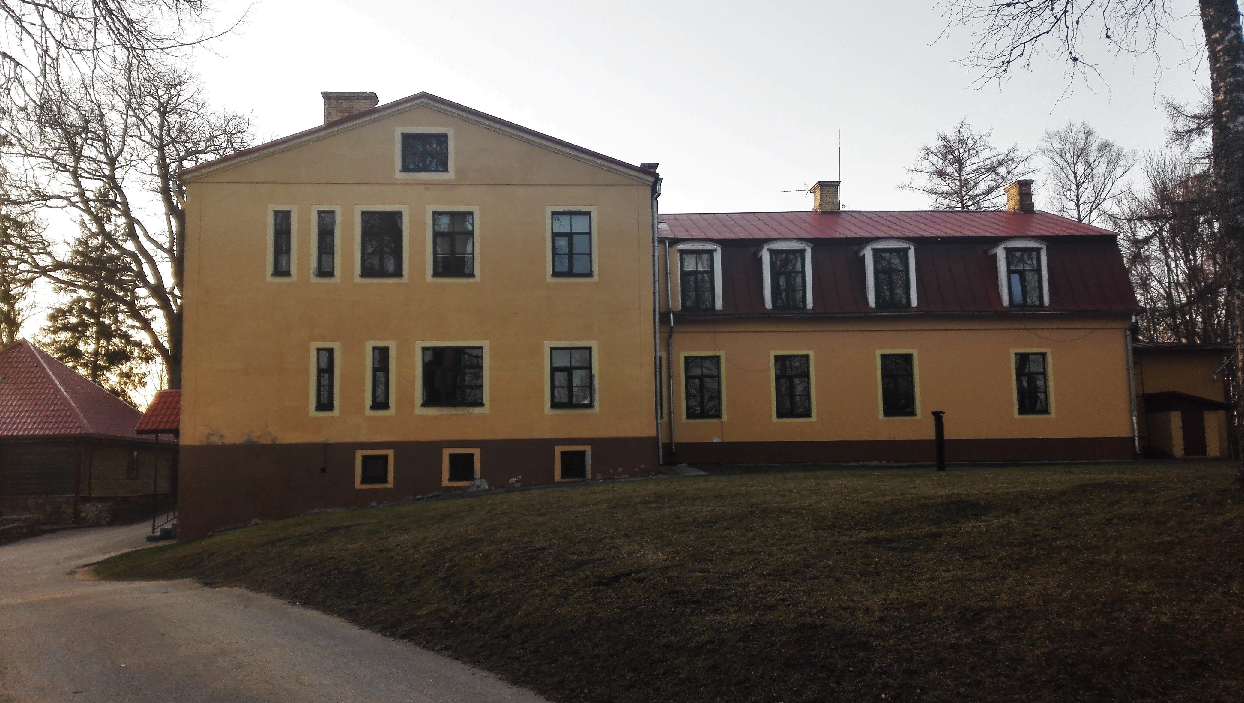 Spāres muižas kungu mājas aizmugurējā daļa, kas nav piedzīvojusi pārmaiņas